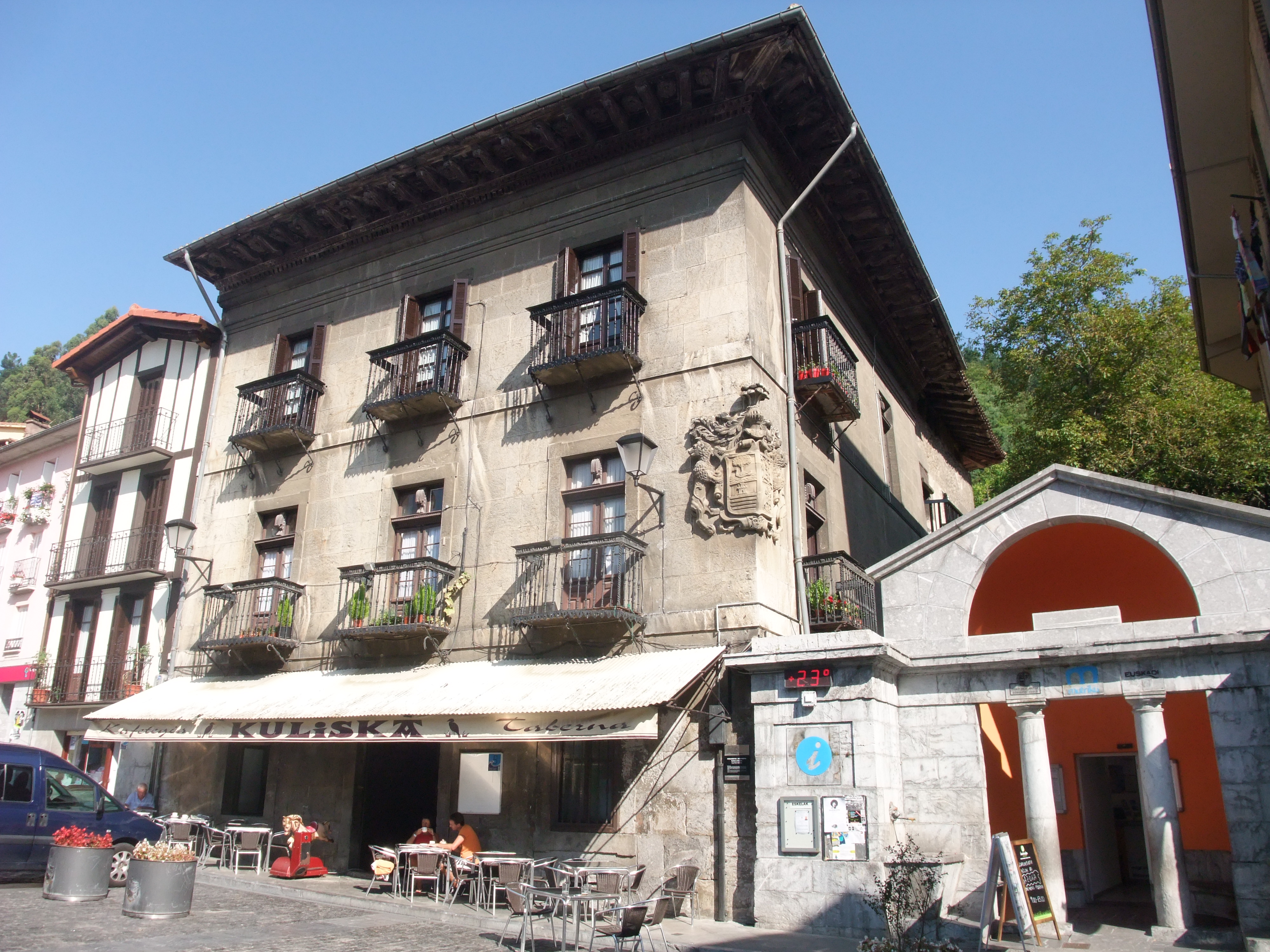 Mutriku (Guipúzcoa)-Casa Gallona-1